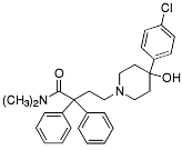 Strukturformel von Loperamid